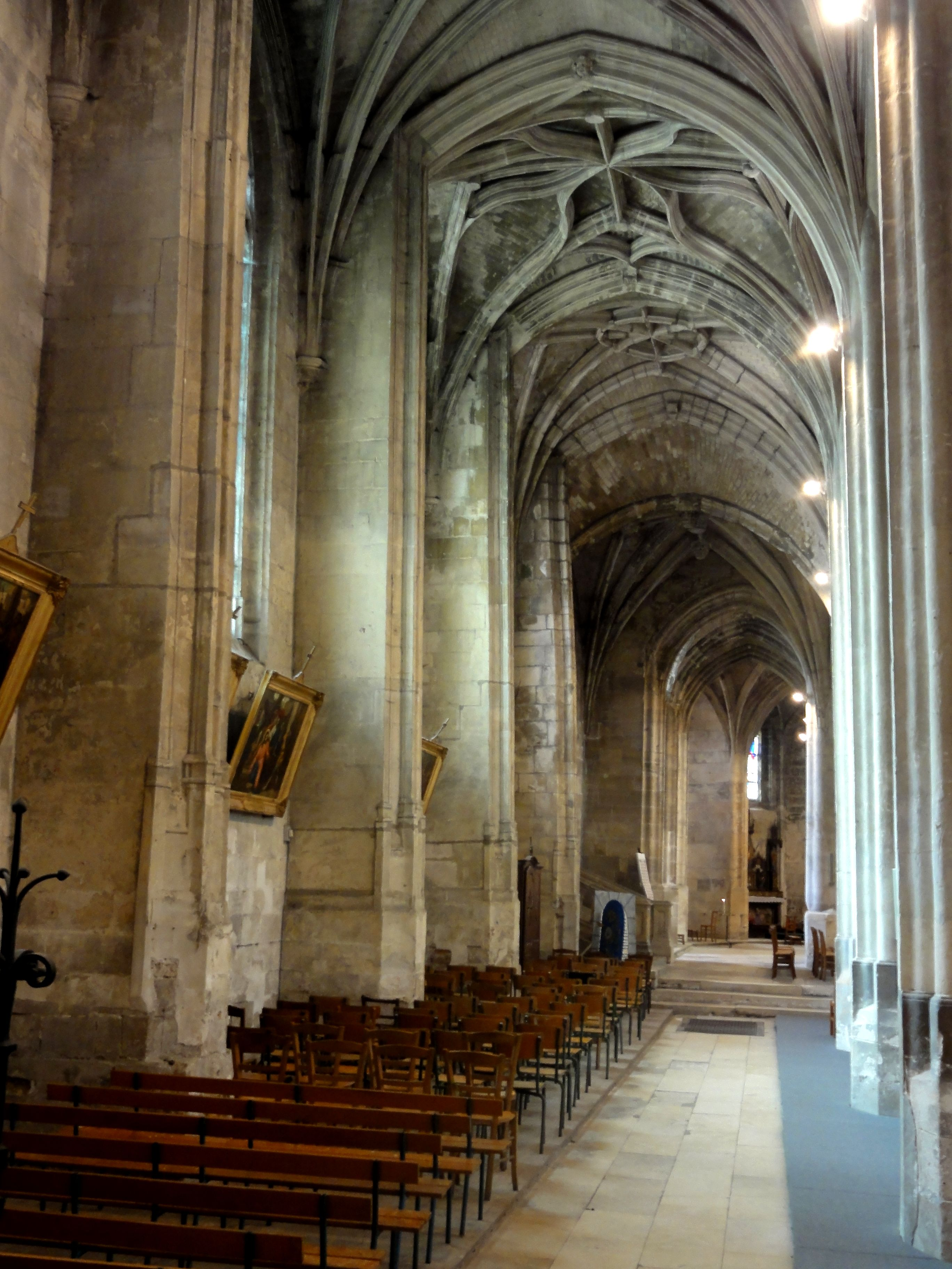 Collatéral nord, vue vers l'est.